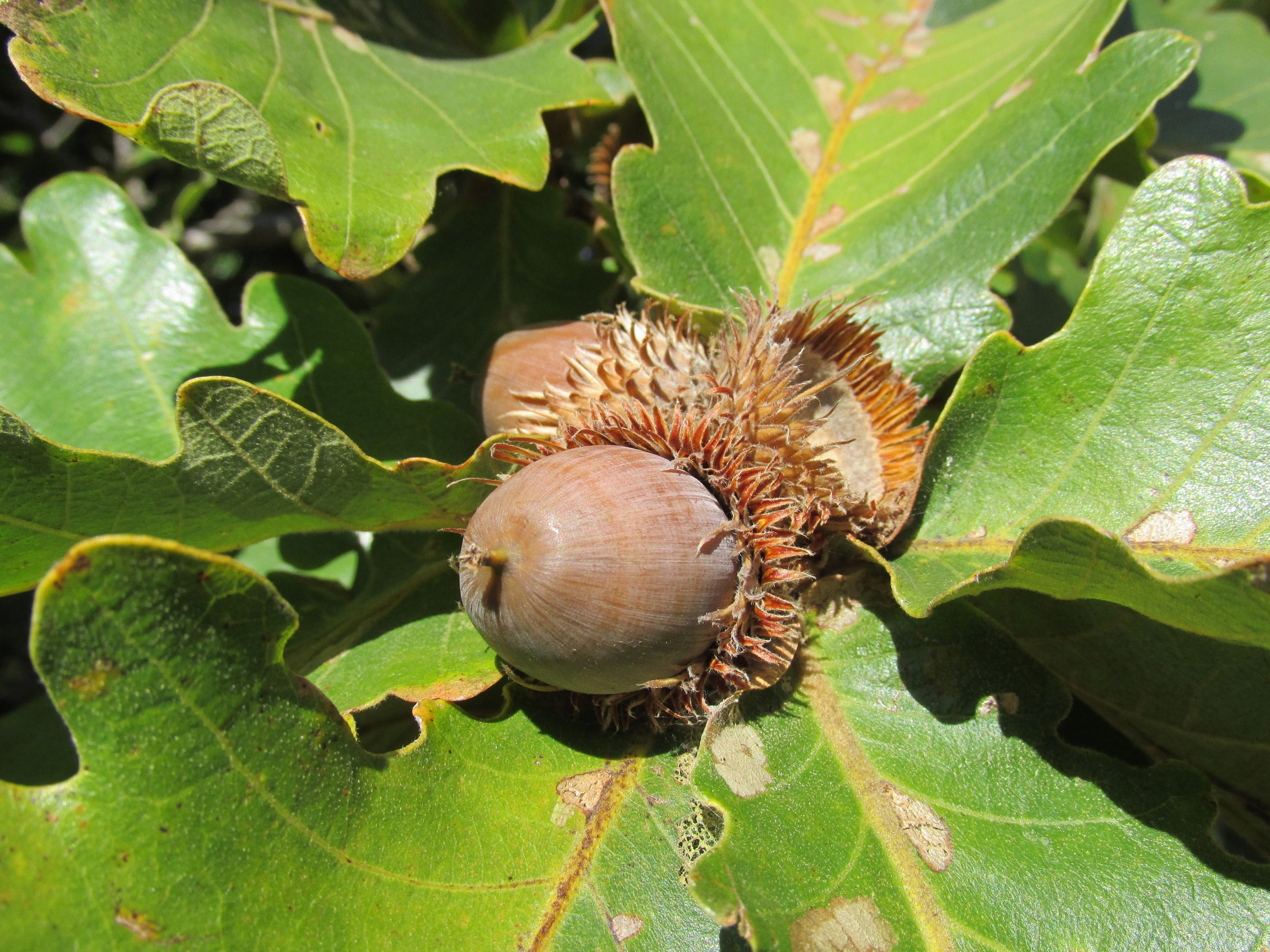 Quercus dentata , Daimyo Oak , カシワ（柏）, どんぐり